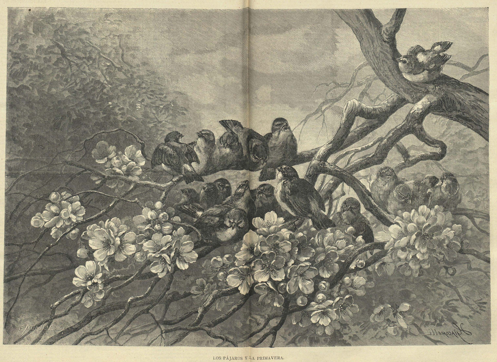 Los pájaros y la primavera, grabado publicado en la revista española La Ilustración Católica.